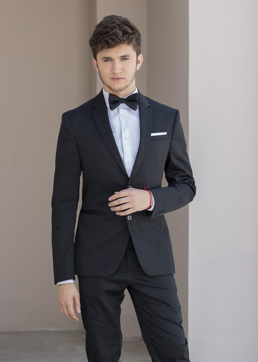 Periodista y presentador de tv hondureño